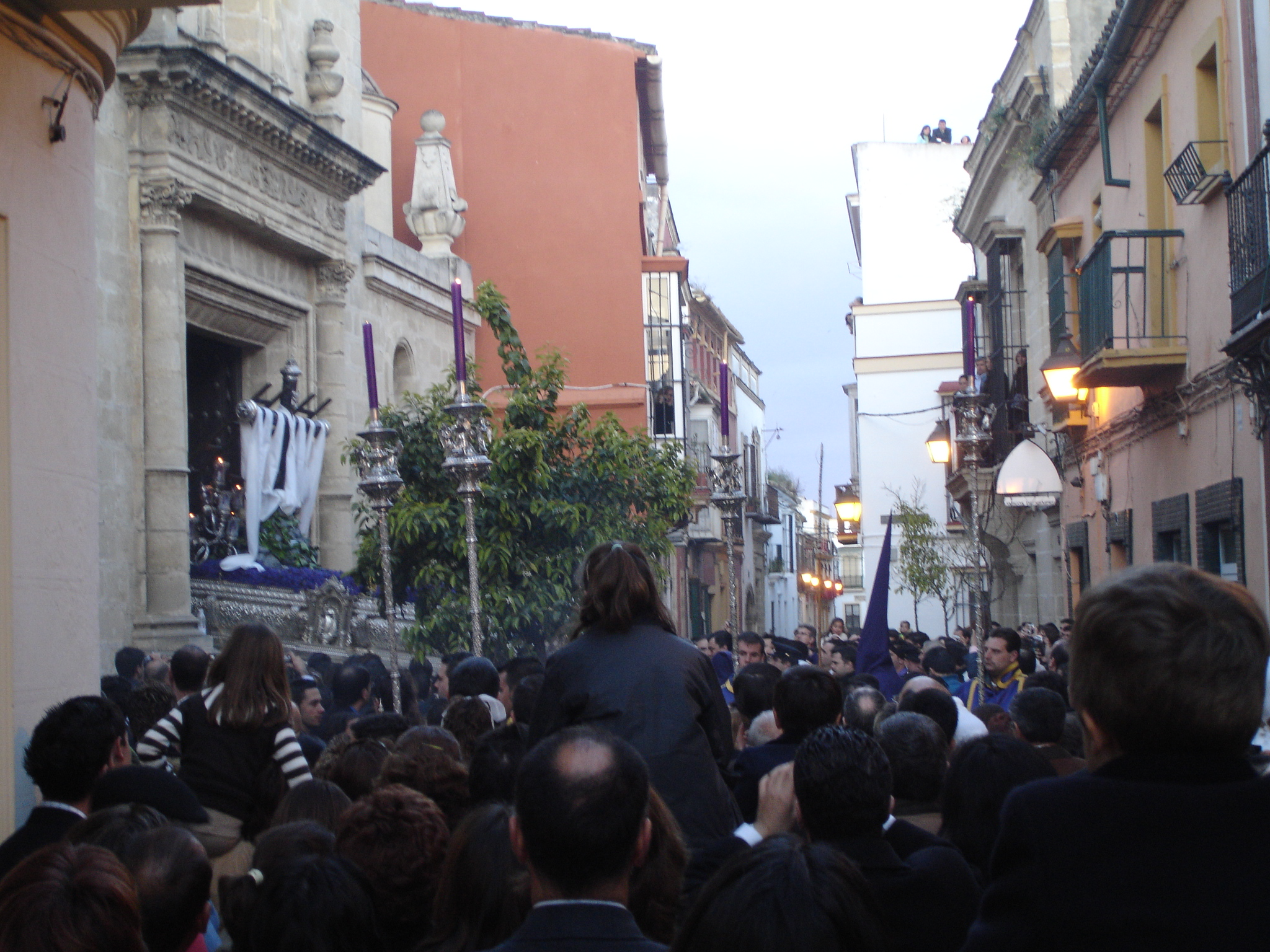 Salida del Paso de San Pedro, Semana Santa de Jerez 2007 (Spain)